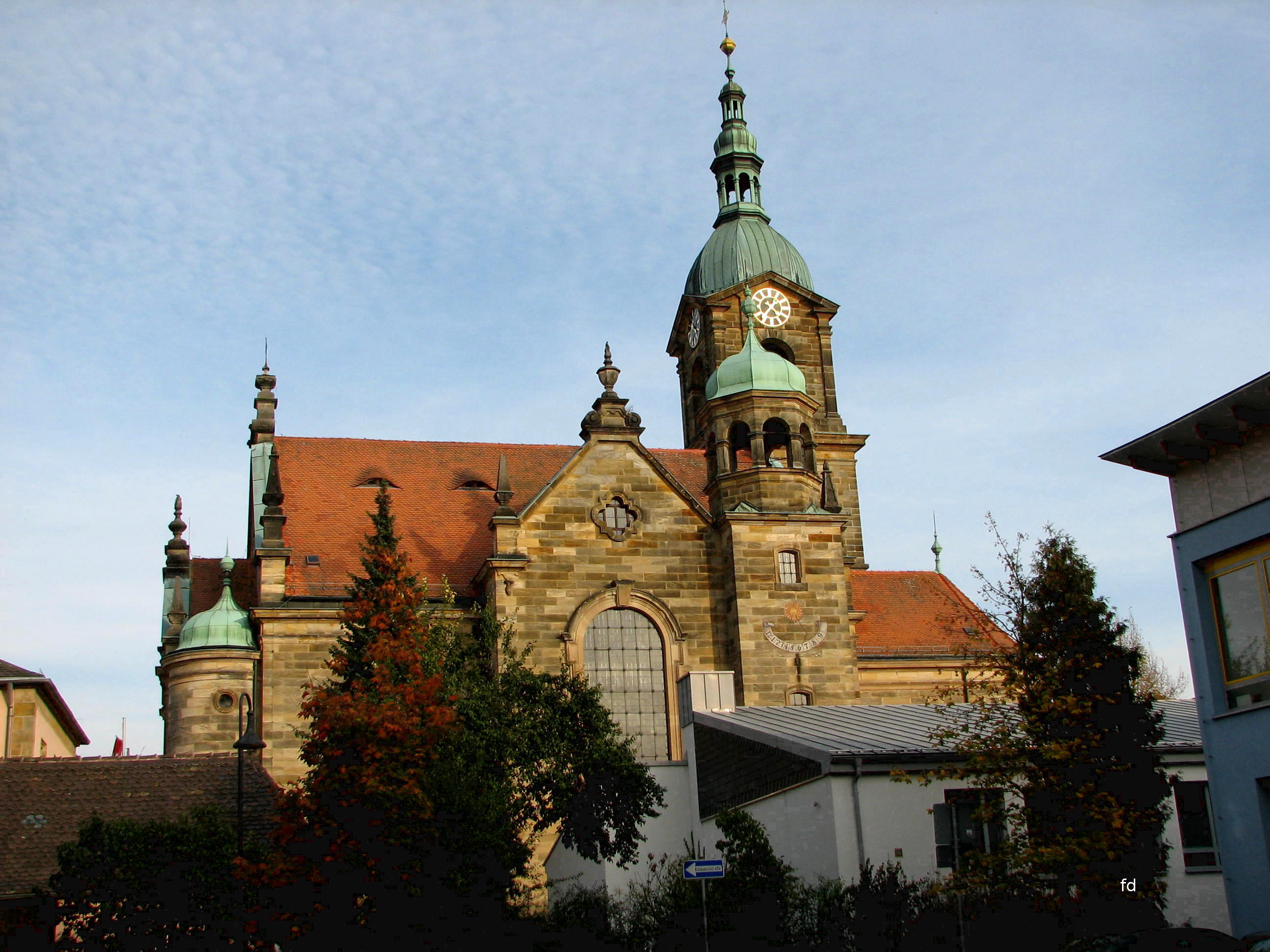 Pfarrkirche St. Bartholomäus in Pegnitz